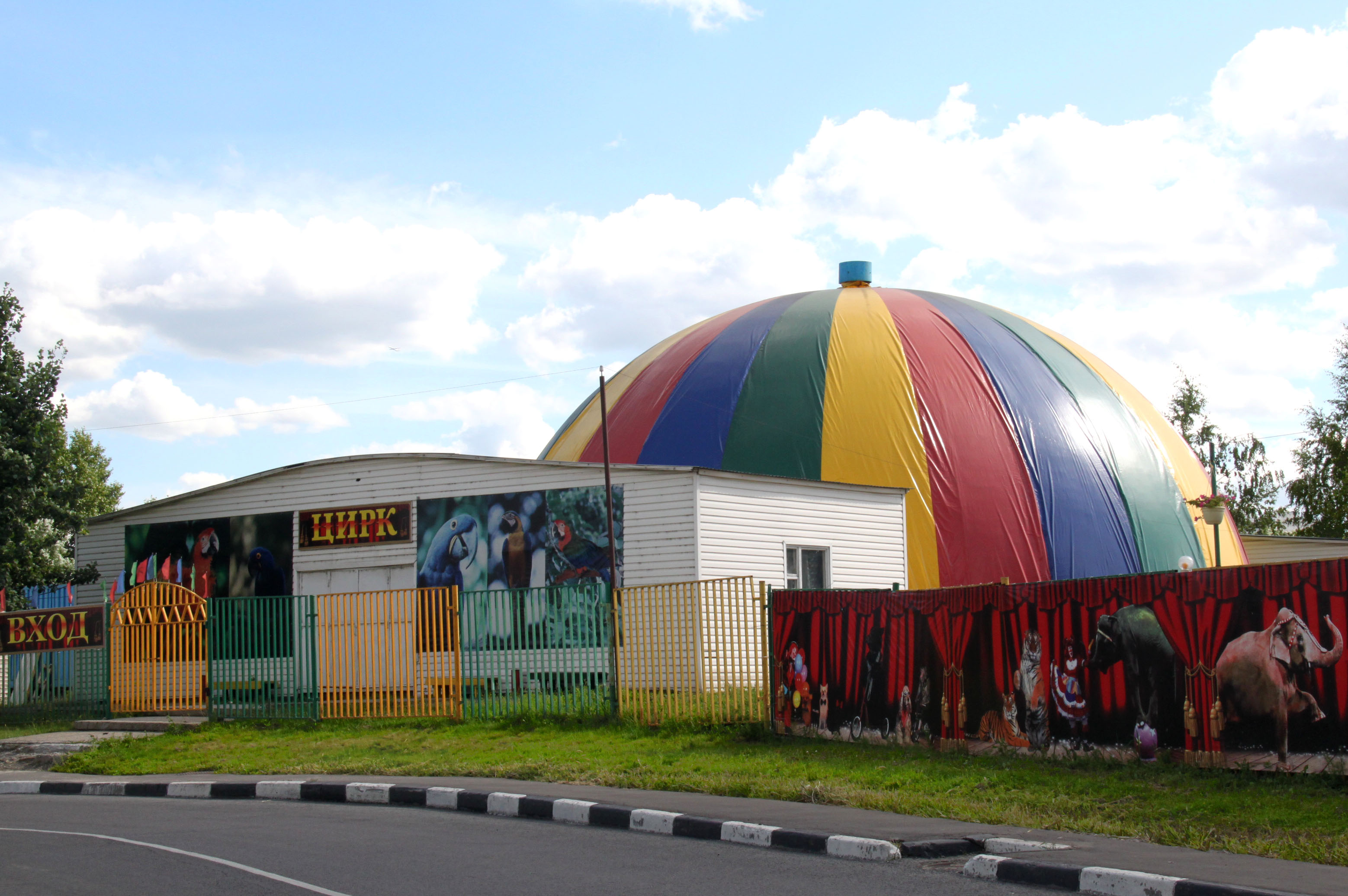 Цирк в Братеево. Улица Братеевская, 21